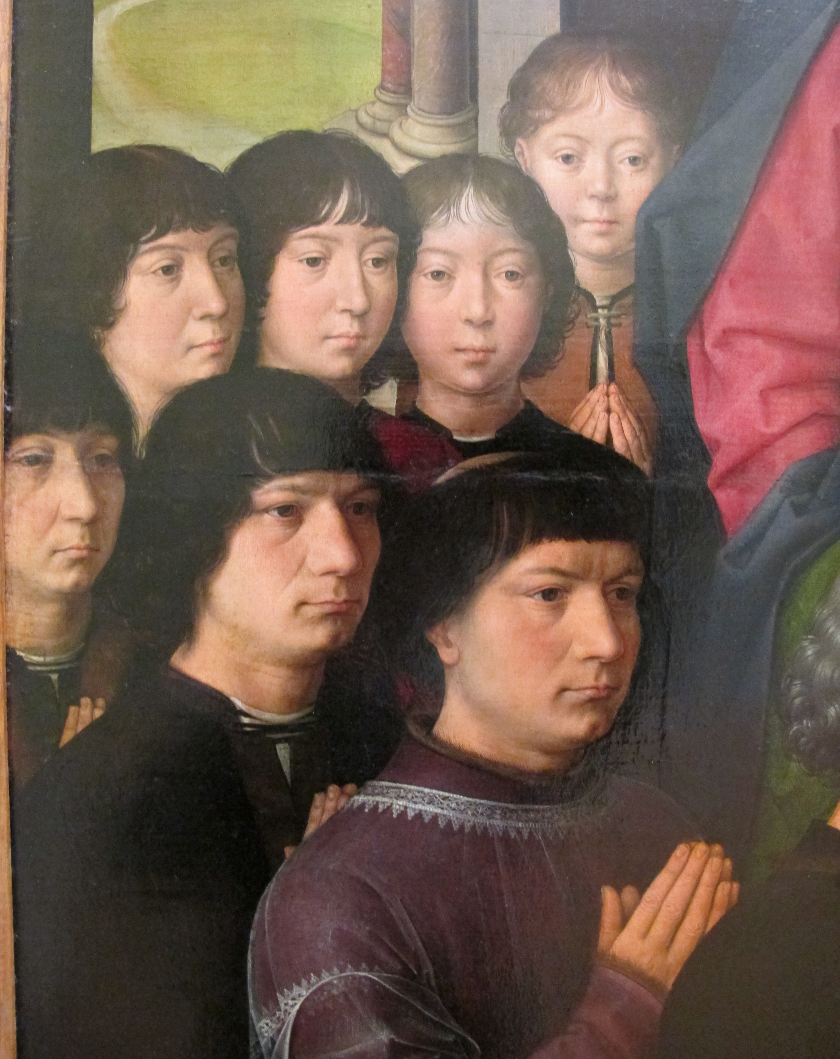 Dipinti fiamminghi del Quattrocento, Louvre, Parigi